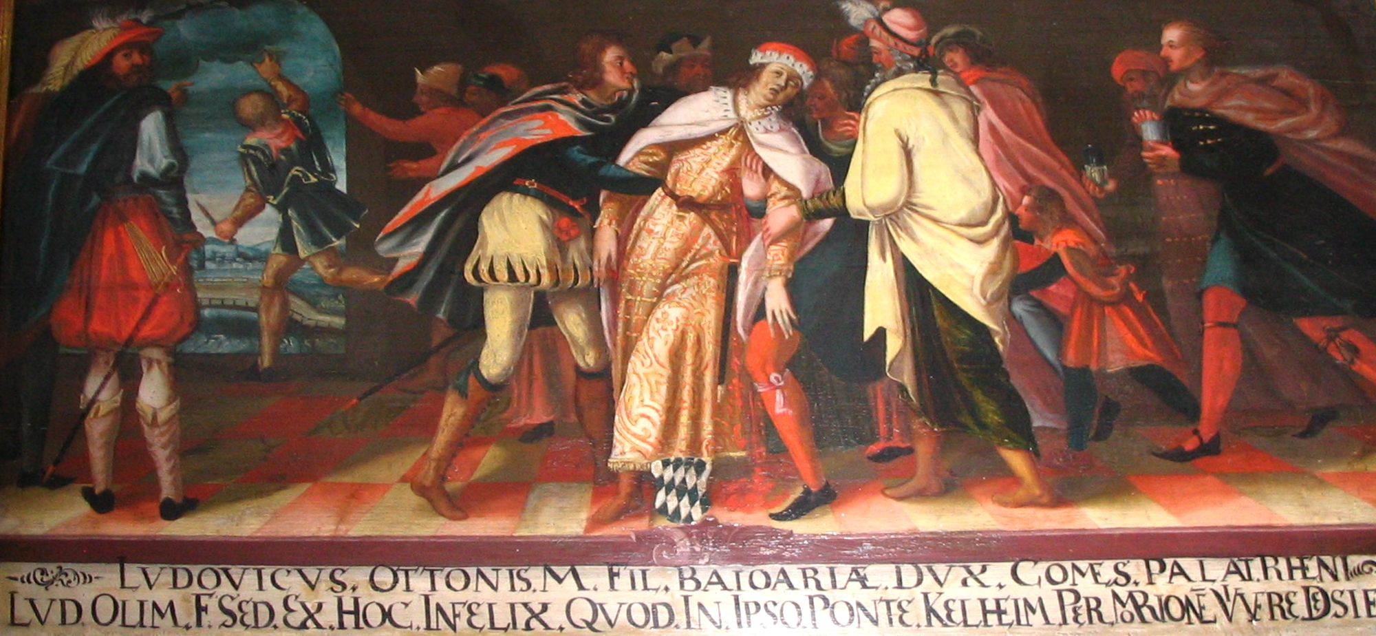 Kloster Scheyern, Johanneskirche, Landkreis Pfaffenhofen, Oberbayern: Darstellung der Ermordung Ludwig des Kelheimers. Sie ist Teil, der in ihren Ursprüngen aus dem Jahre 1382 stammenden, in der Kirche ausgestellten 20ig-teiligen Serie von Fürstenbildern, welche im Kontext zum dortigen ältesten Wittelsbacher-Familiengab die Geschichte Scheyerns und des Hauses Wittelsbach darstellen.